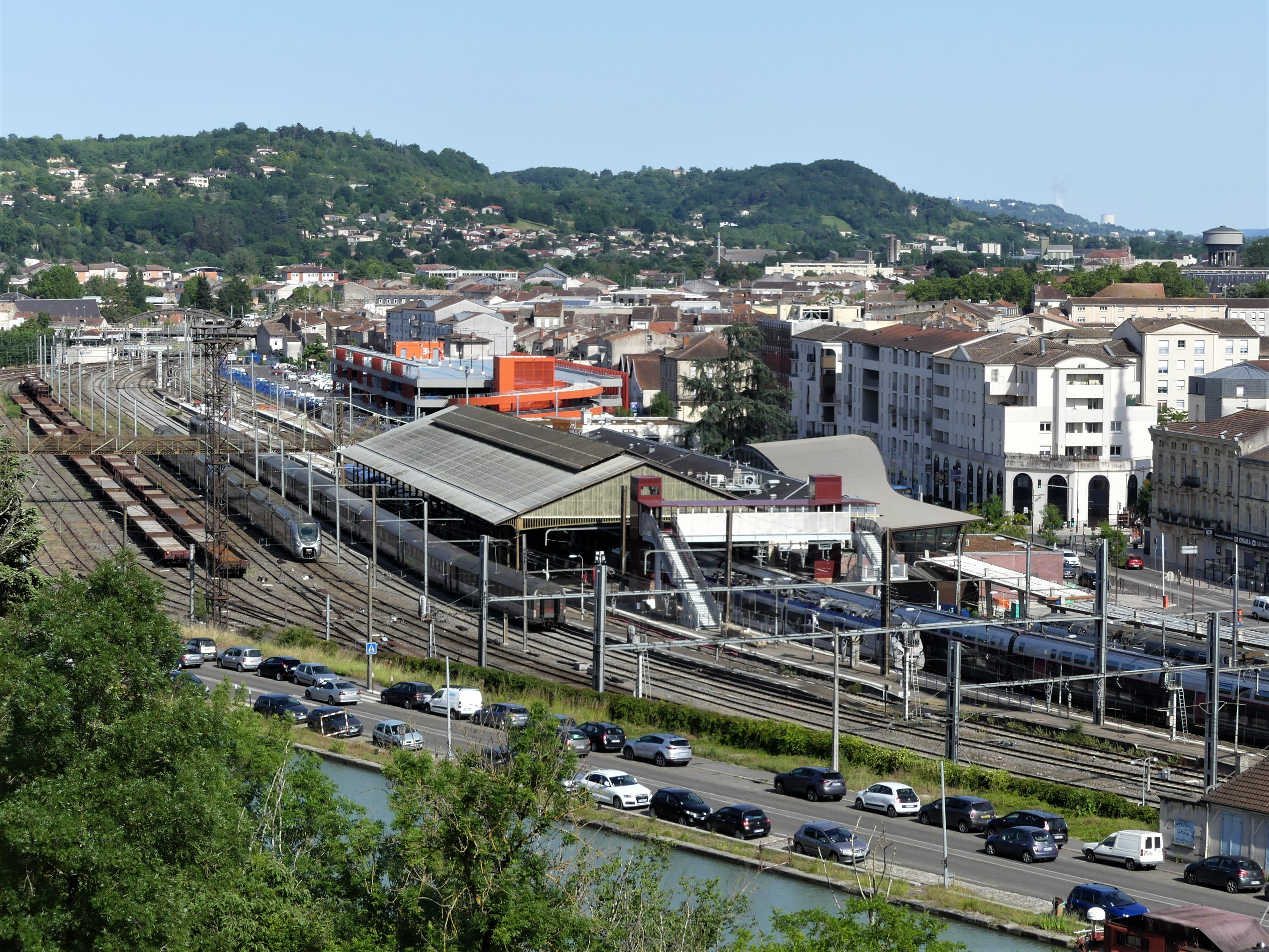 La gare d'Agen, Lot-et-Garonne, France.